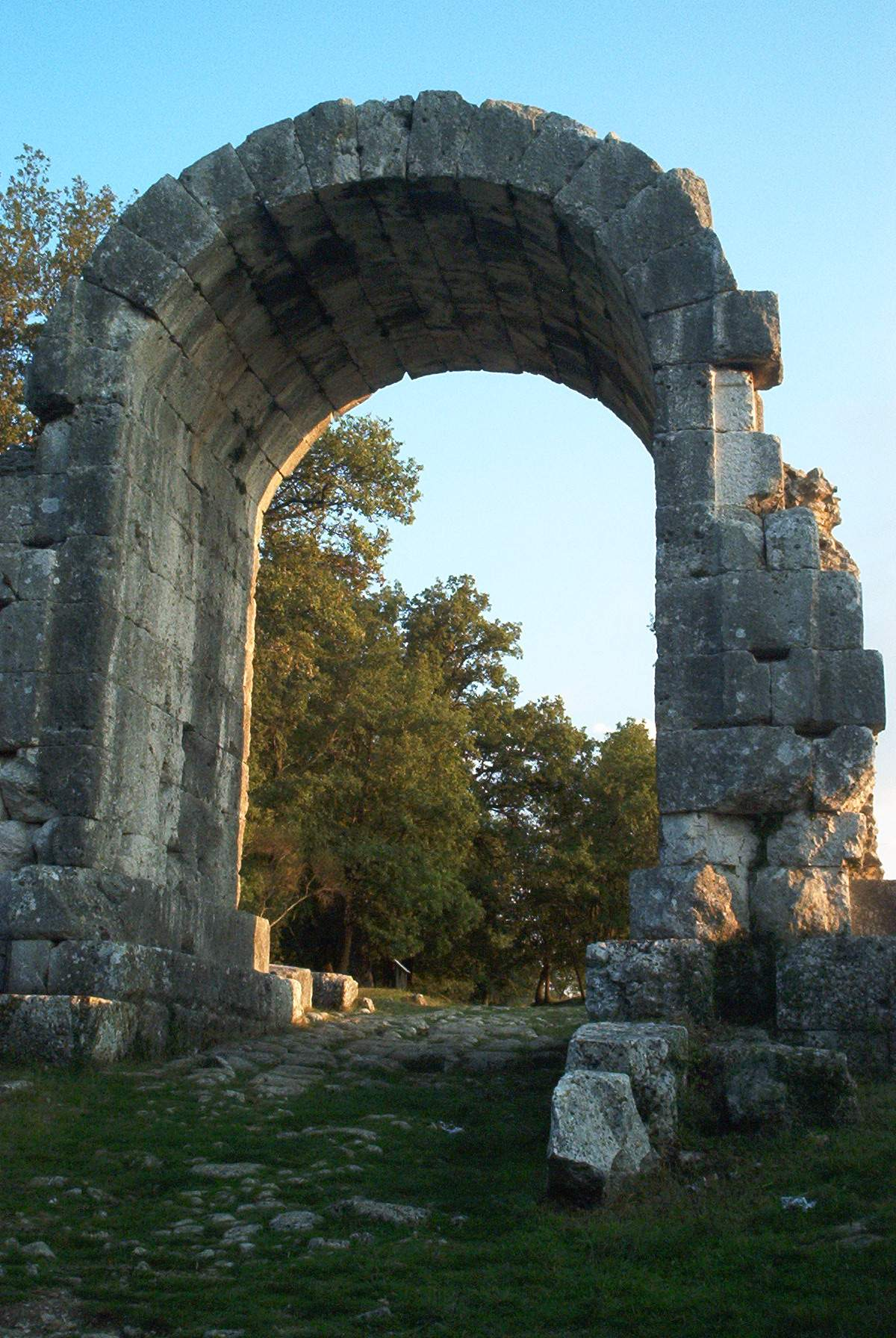 L'arco di ingresso sulla antica via Flaminia della città romana di Carsulae, nei dintorni di Terni.